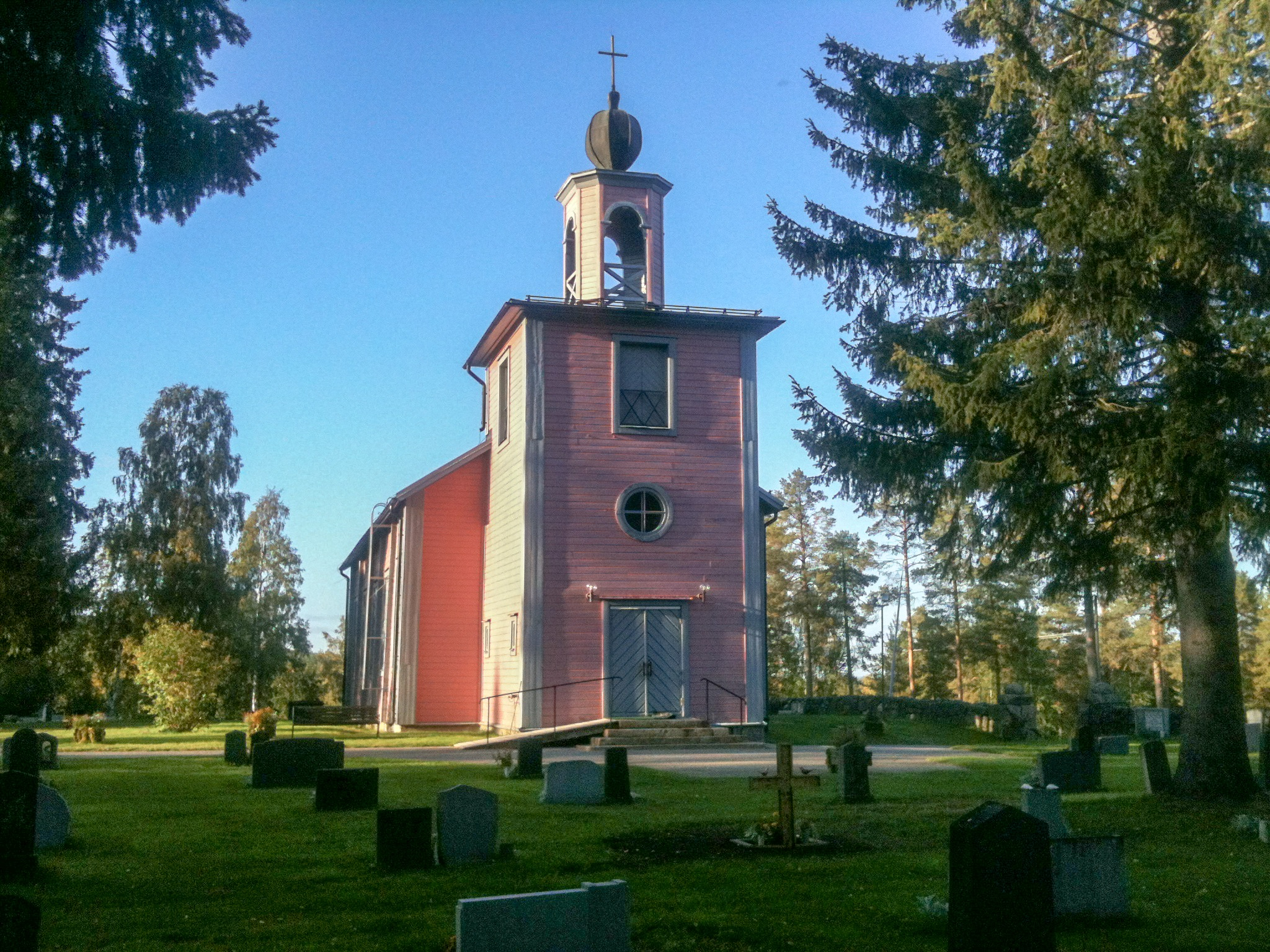 Svansteins kyrka, bild tagen på eftermiddagen den första september 2014